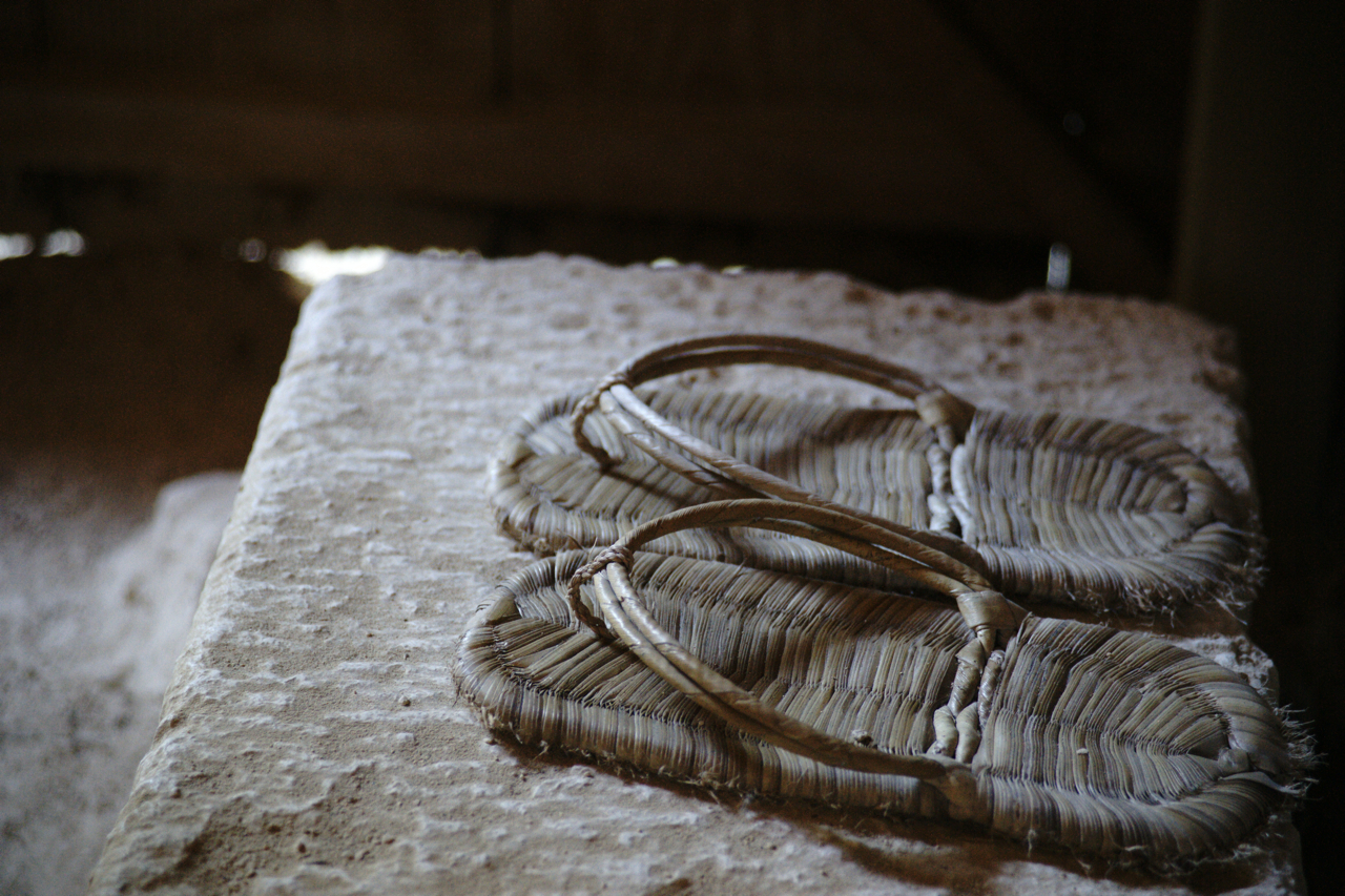 Shikinaen, Okinawa, JAPAN (Sony %u03B1900 / AF24-105mmF3.5-4.5D)